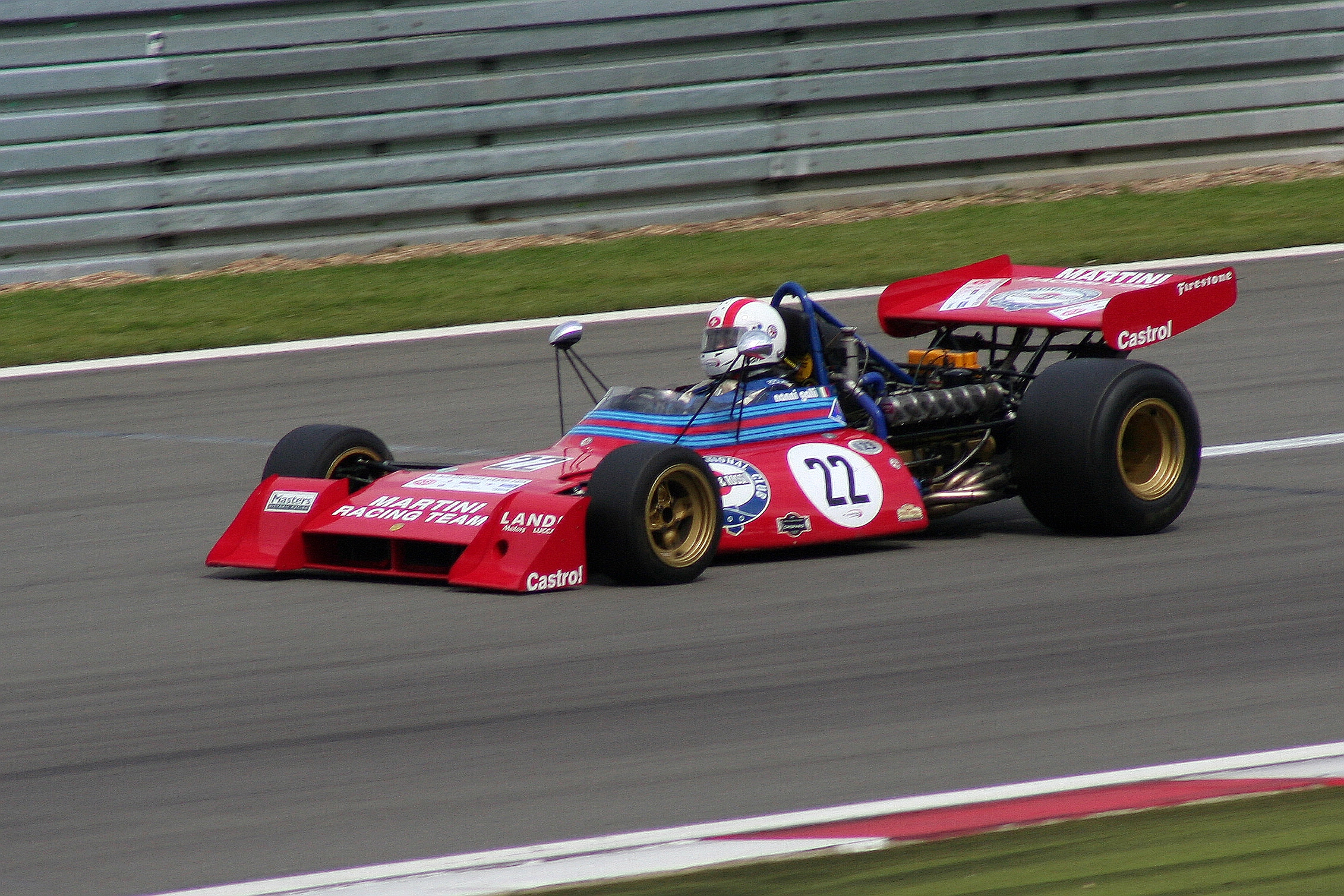 Tecno PA123 Formel 1, Baujahr 1972, beim AvD-Oldtimer-Grand-Prix auf dem Nürburgring am Ende der Zielgeraden, Fahrer: Carlos Steinhauslin, Italien